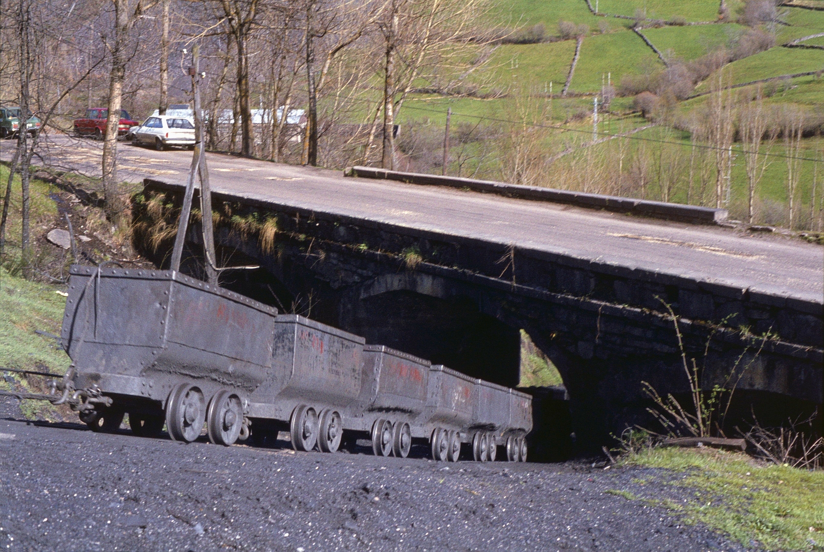 Un groupe de berlines vides remonte un plan incliné vers Villaseca de Laciana en 1983.